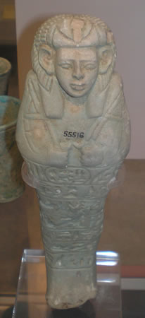 Bildbeschreibung: Uschebti der nubischen Königin Nasalsa (Britisches Museum, London) Quelle: Britisches Museum, London Fotograf/Zeichner: Udimu Datum: 27.03.2006 Description: Shabti of queen Nasalsa (British Museum London Source: British Museum, London Photographer: Udimu Date: 27.03.2006 10:34, 28. Mär 2006 Udimu 206 x 450 (13902 Byte) ( * Bildbeschreibung: Uschebti der nubischen Königin Nasalsa (Britisches Museum, London) * Quelle: Britisches Museum, London * Fotograf/Zeichner: Udimu * Datum: 27.03.2006 * Description: Shabti of queen Nas)